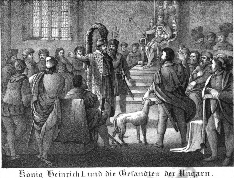 Saxonia Museum für saechsische Vaterlandskunde. Band 1. Dresden: Pietzsch und Comp. Siehe File:Saxonia Museum für saechsische Vaterlandskunde I.djvu